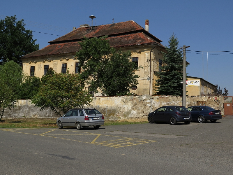 Zámek Přestavlky, Přestavlky (okres Plzeň-jih).